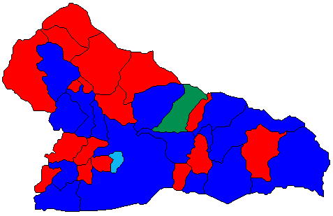 Resultado de las elecciones municipales españolas de 2015 en la comarca de la Axarquía. Partido más votado por municipio.